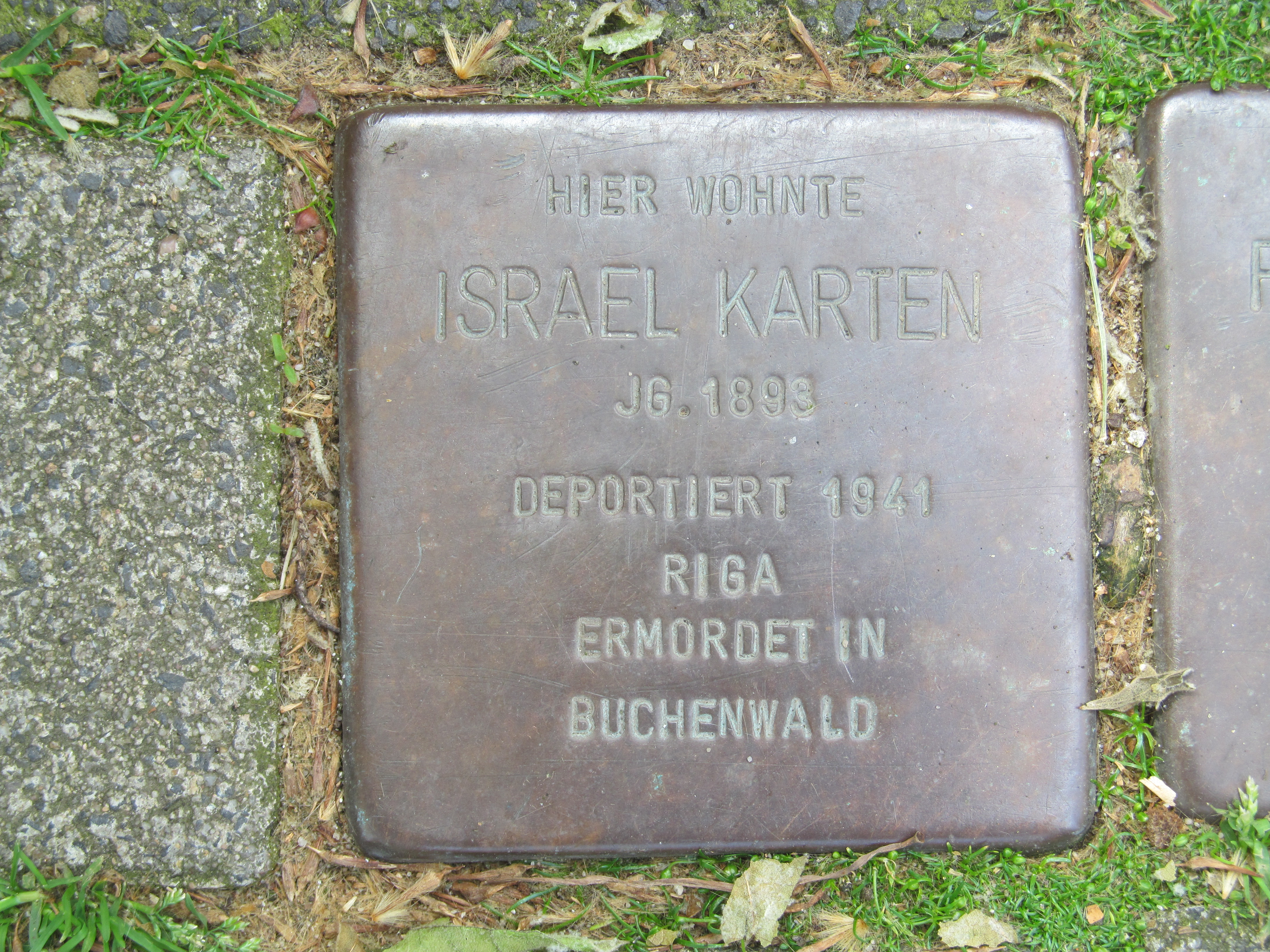 der Stolperstein für Israel Karten vor dem Haus Rheinstraße 27 in Duisburg-Homberg